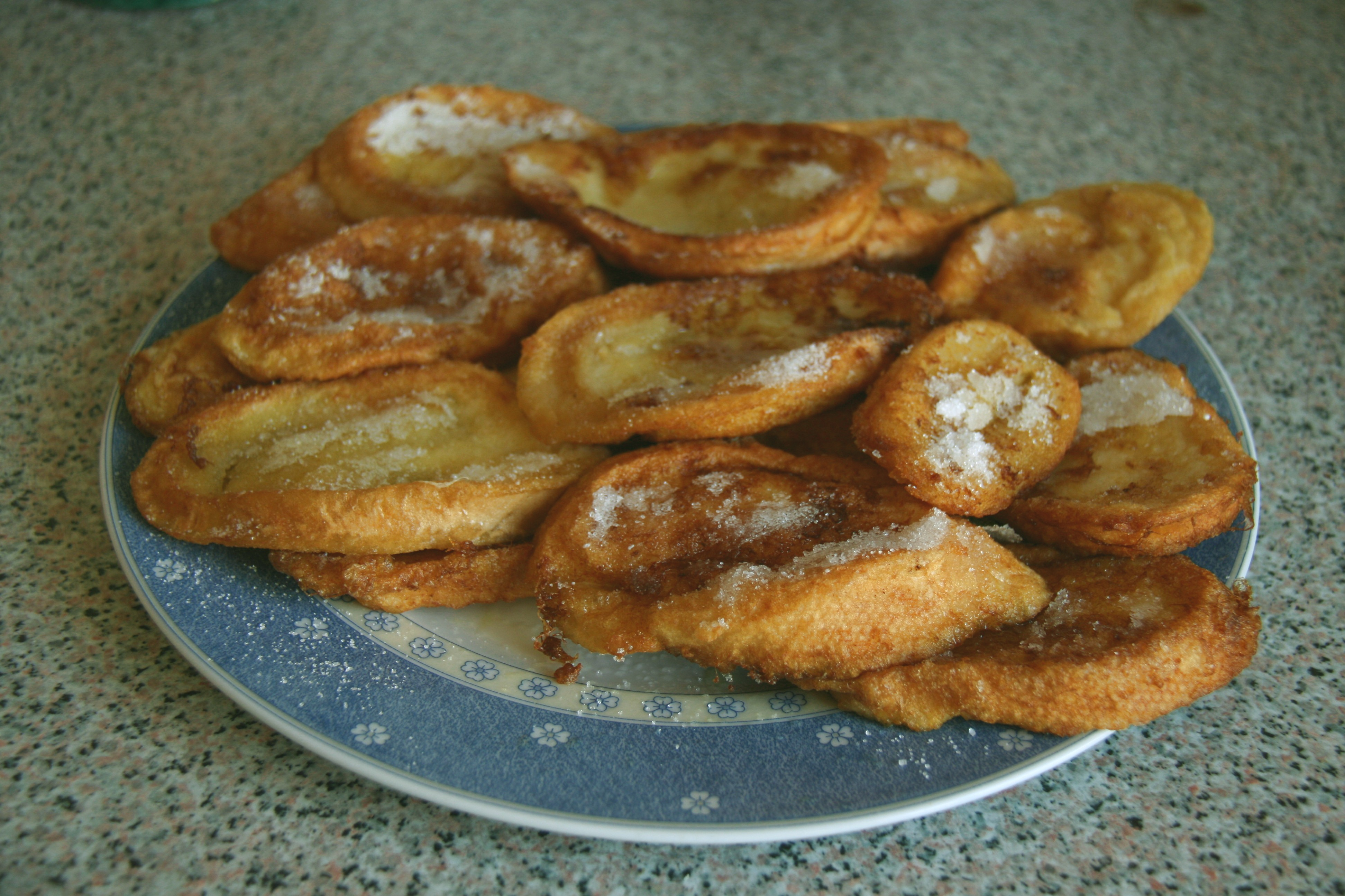 fuente de torrijas